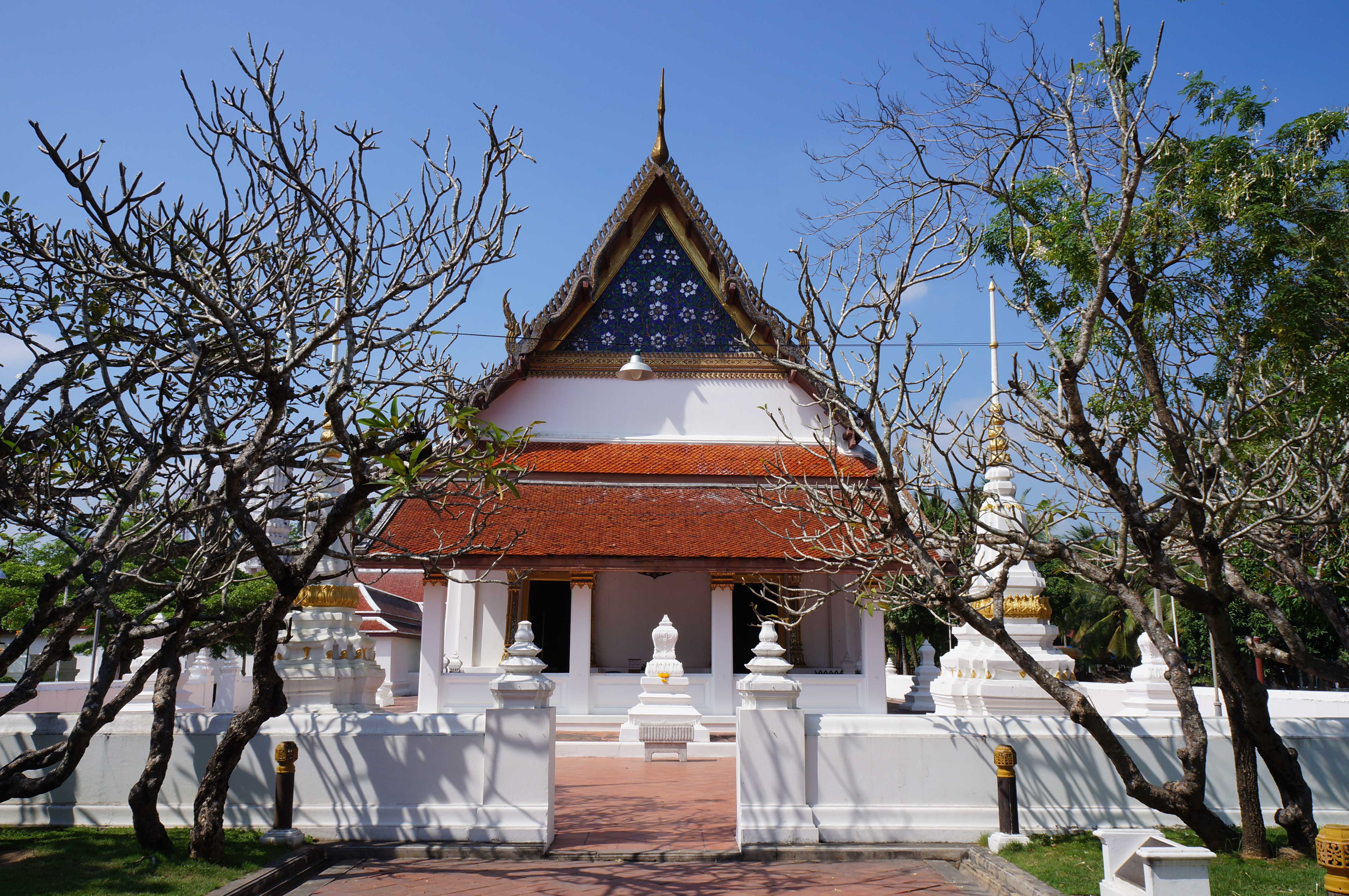 วัดอัมพวันเจติยาราม เป็นพระอารามหลวงชั้นโท ตั้งอยู่ปากคลองอัมพวาด้านเหนือ เดิมเรียกกันว่า "วัดอัมพวา" ต่อมาพระบาทสมเด็จพระนั่งเกล้าเจ้าอยู่หัว ได้พระราชทานนามใหม่ว่า "วัดอัมพวันเจติยาราม" มีความหมายว่า "วัดที่มีเจดีย์และมีสวนมะม่วงเป็นที่รื่นรมย์และเกษมสำราญน่าเคารพบูชา" วัดนี้เป็นวัดต้นวงศ์ราชินิกุล โดยสมเด็จพระรูปศิริโสภาคย์มหานาคนารี (สั้น) พระชนนีในสมเด็จพระอัมรินทรามาตย์ (นาก) ทรงบริจาคที่ดินและสมเด็จพระอัมรินทรามาตย์ได้ทรงรวบรวมพระพี่พระน้องรว่มกันสร้างเป็นวัดขึ้นมา ในรัชสมัยพระบาทสมเด็จพระนั่งเกล้าเจ้าอยู่หัวทรงโปรดเกล้าฯ ให้มีการบูรณะใหญ่และทรงสร้างพระปรางค์ เป็นที่บรรจุพระบรมสรีรังคารและพระบรมอัฐิบางส่วนของพระบาทสมเด็จพระพุทธเลิศหล้านภาลัย พระบรมราชชนก นอกจากนี้ยังทรงสร้างพระวิหารและพระที่นั่งทรงธรรมขึ้นอีกด้วย